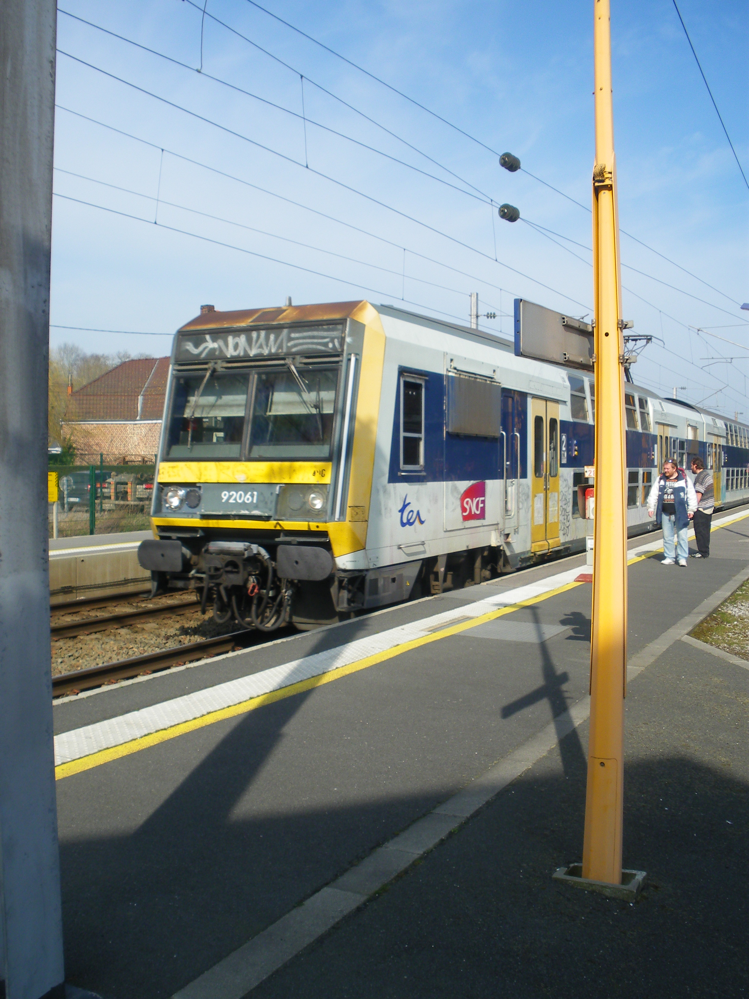 Train TER s'arrêtant en gare d'Arnèke.